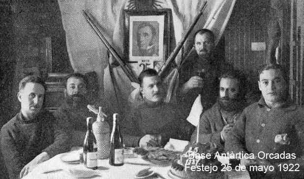 Festejo del 25 de mayo de 1927 en la Base Orcadas.